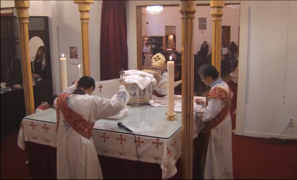 Boska Liturgia Kościoła koptyjskiego - podniesienie